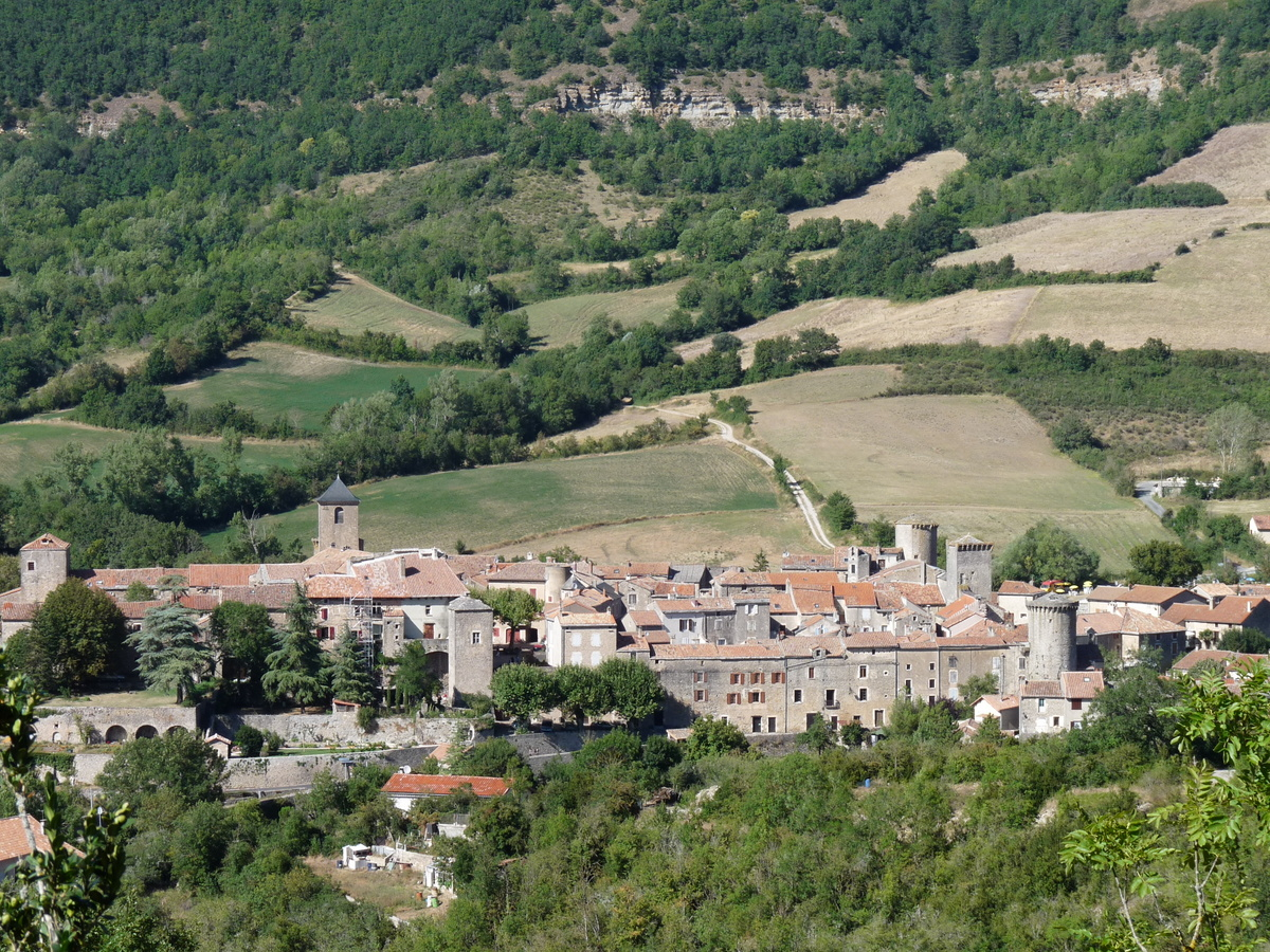 Château des Templiers, (ClasséInscrit, 19762003)